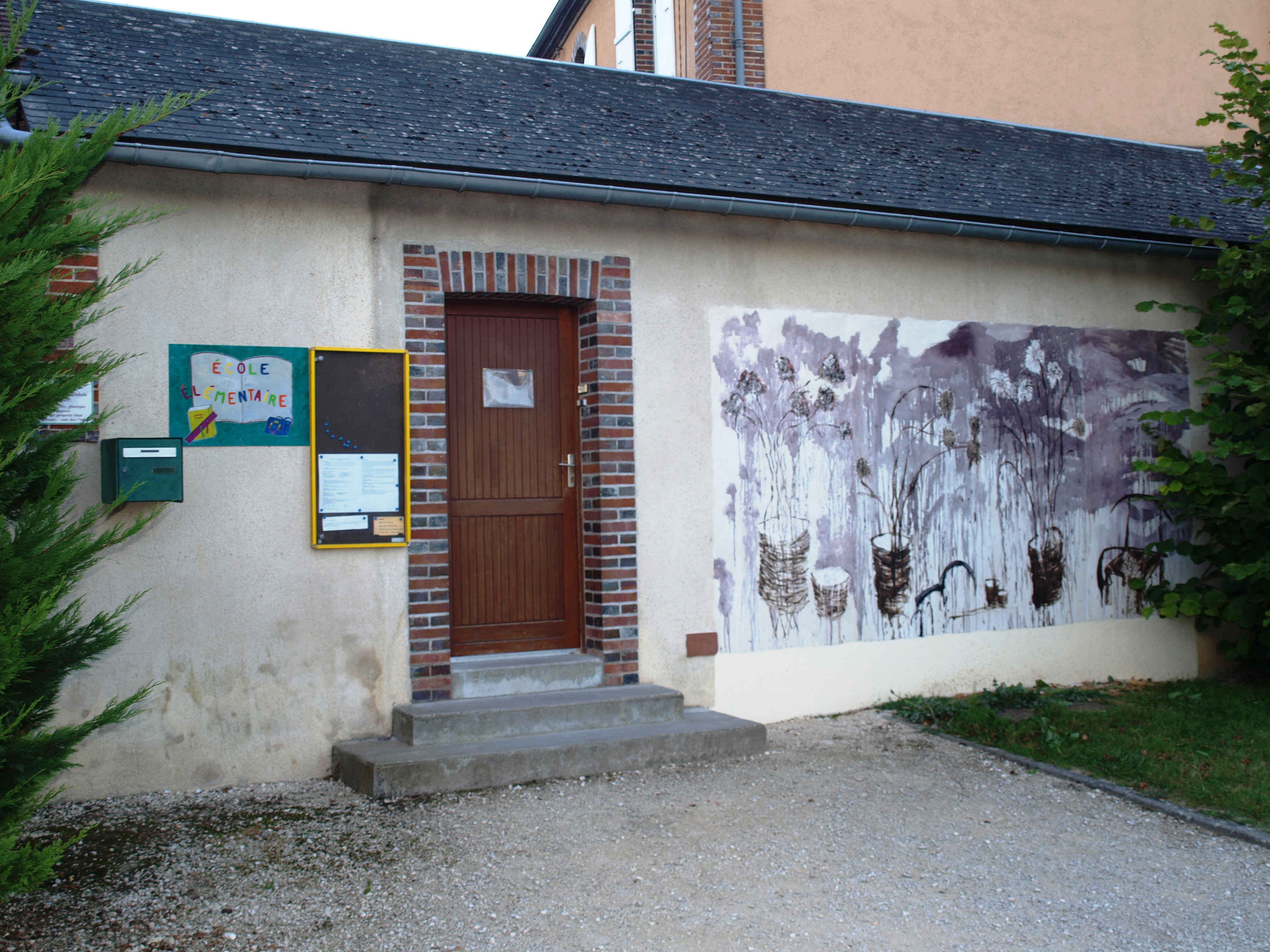 Saint-Aubin-Château-Neuf (Yonne, France) ; école élémentaire, sa fresque.